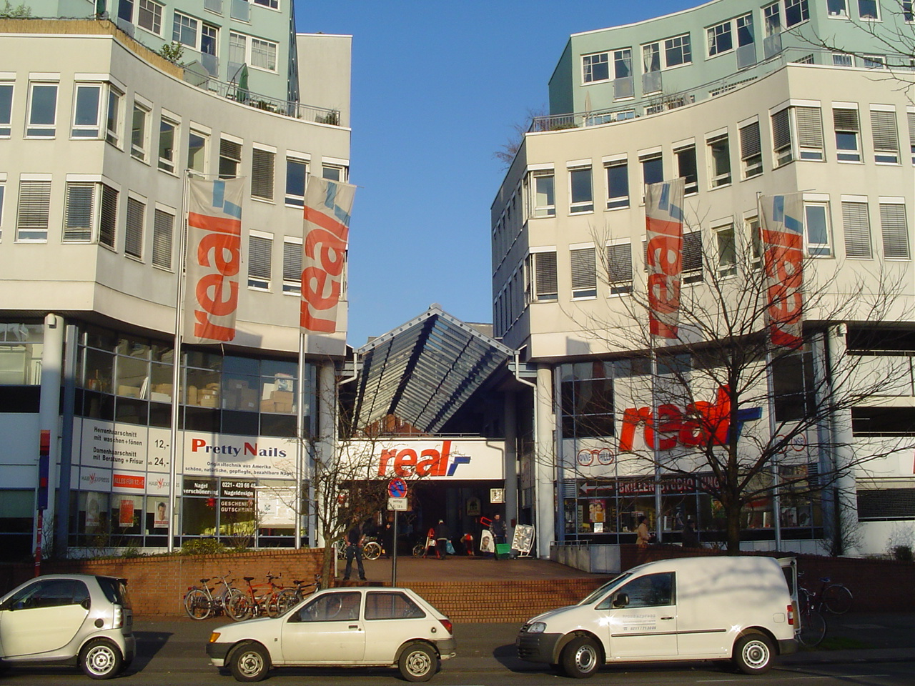 Real Markt, Köln-Klettenberg